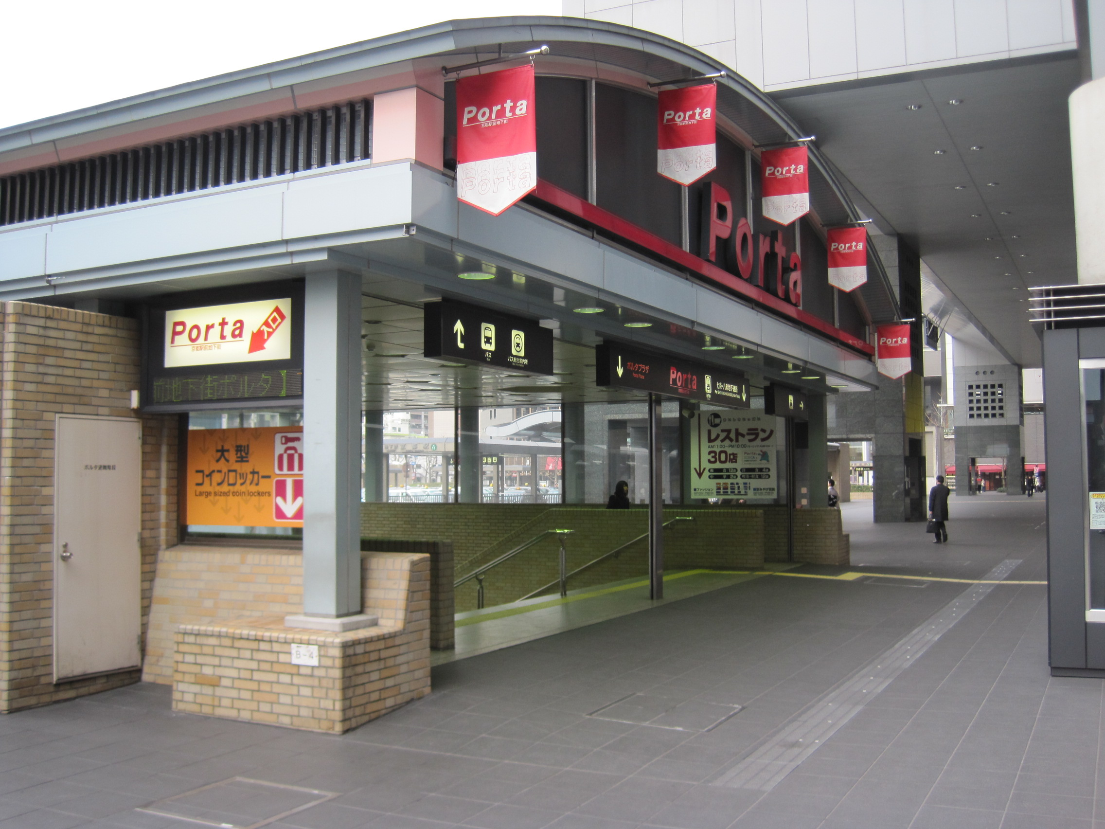 京都駅前地下街ポルタ入口（JR京都駅烏丸口）